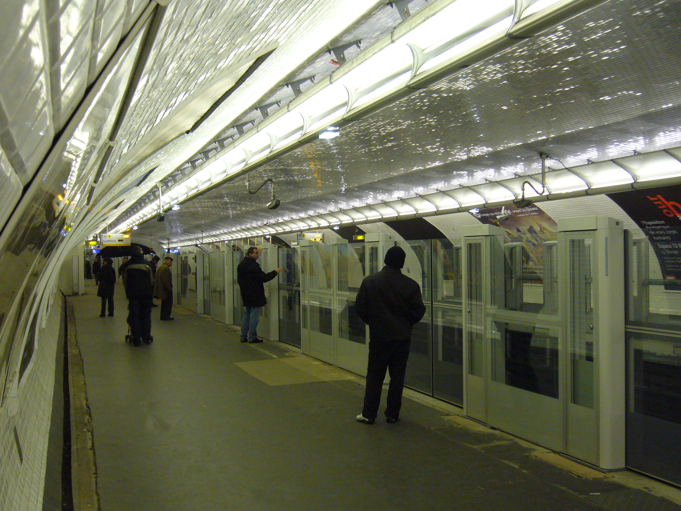 Installation des façades de quai à Bérault sur la ligne 1 du métro de Paris.